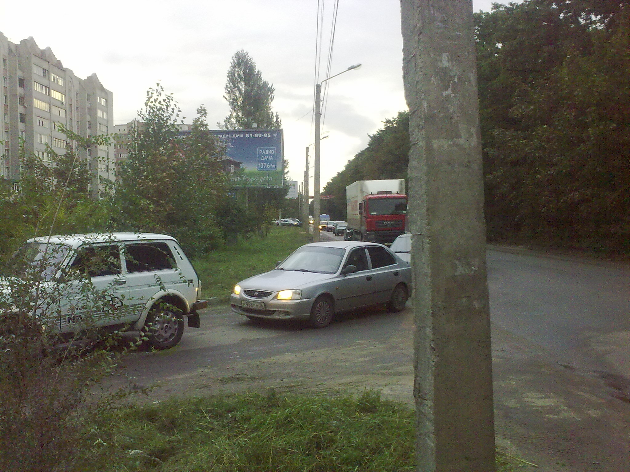 Пробка на улице Ломоносова в Воронеже